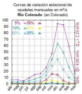 Curva de Variación Estacional Río Colorado (Aconcagua) en Colorado. # cita publicación # | apellido = Dirección General de Aguas # | nombre = # | enlace-autor = Ministerio de Obras Públicas (Chile) # | título = Diagnóstico y clasificación de los cursos y cuerpos de agua según objetivos de calidad. Cuenca del río Aconcagua # | ubicación = Santiago de Chile # | editorial = Ministerio de Obras Públicas (Chile) # | año = 2004 # | edición = # | url = # | ref = harv # Tabla 4.4: Río Colorado en Colorado (m3/s) pág. 52 mes 5% 10% 20% 50% 85% 95% abr 6.229 3.405 1.638 0.405 0.072 0.026 may 6.277 3.433 1.653 0.409 0.073 0.027 jun 4.513 2.626 1.362 0.389 0.083 0.033 jul 9.306 4.844 2.196 0.484 0.075 0.025 ago 14.258 7.226 3.172 0.658 0.095 0.030 sep 16.306 10.545 6.187 2.162 0.491 0.134 oct 25.210 19.051 13.405 6.428 1.926 0.456 nov 47.968 38.296 28.772 15.628 5.625 1.815 dic 94.633 63.351 38.668 14.373 3.263 0.654 ene 92.641 49.128 22.759 5.179 0.771 0.204 feb 58.408 26.041 9.792 1.516 0.160 0.048 mar 15.646 8.401 3.956 0.938 0.159 0.056 This plot was created with Gnuplot.